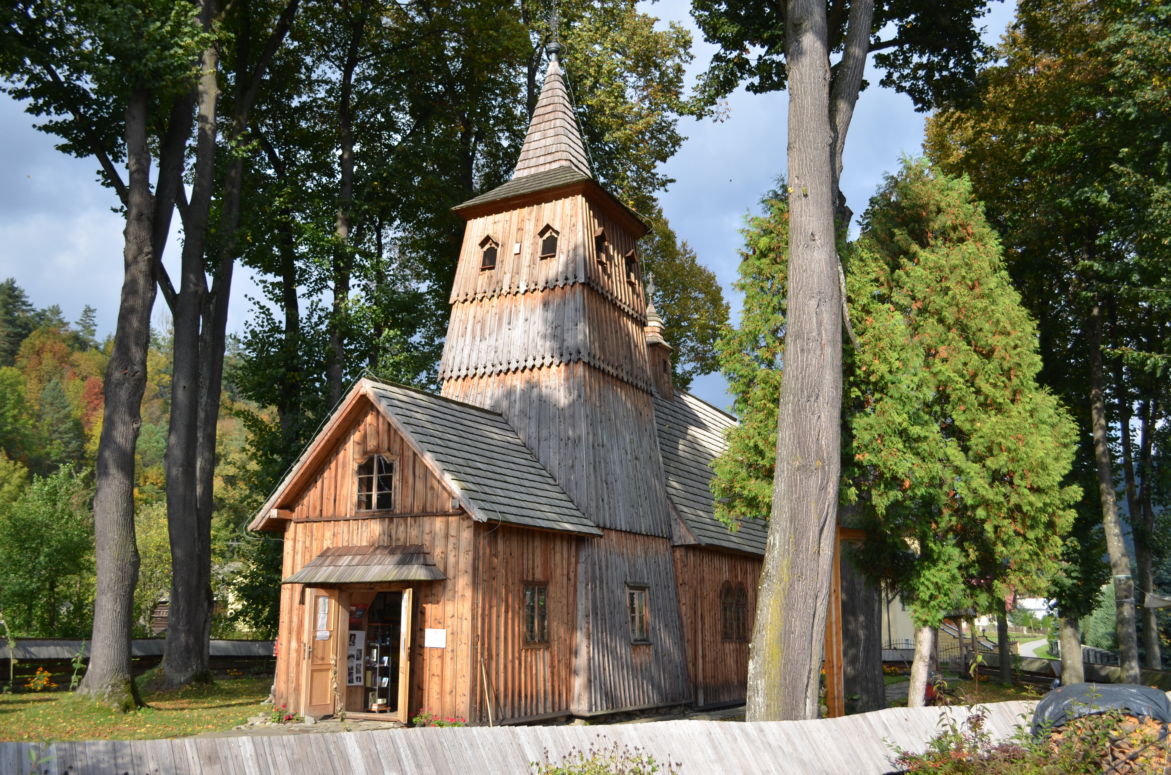 Sromowce Niżne. Kościół par. p.w. św. Katarzyny, kon. XVI.